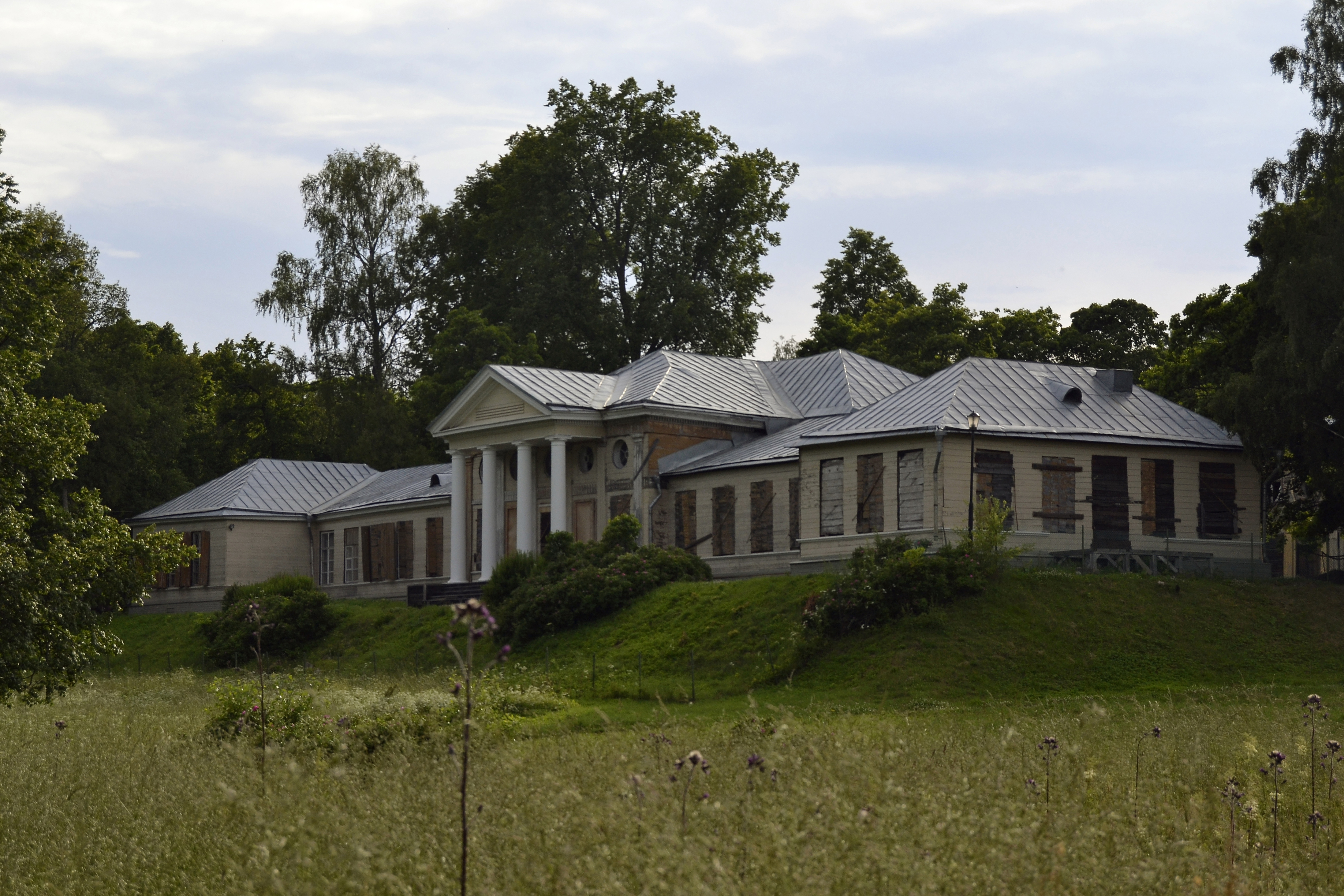 Выборг, парк Монрепо